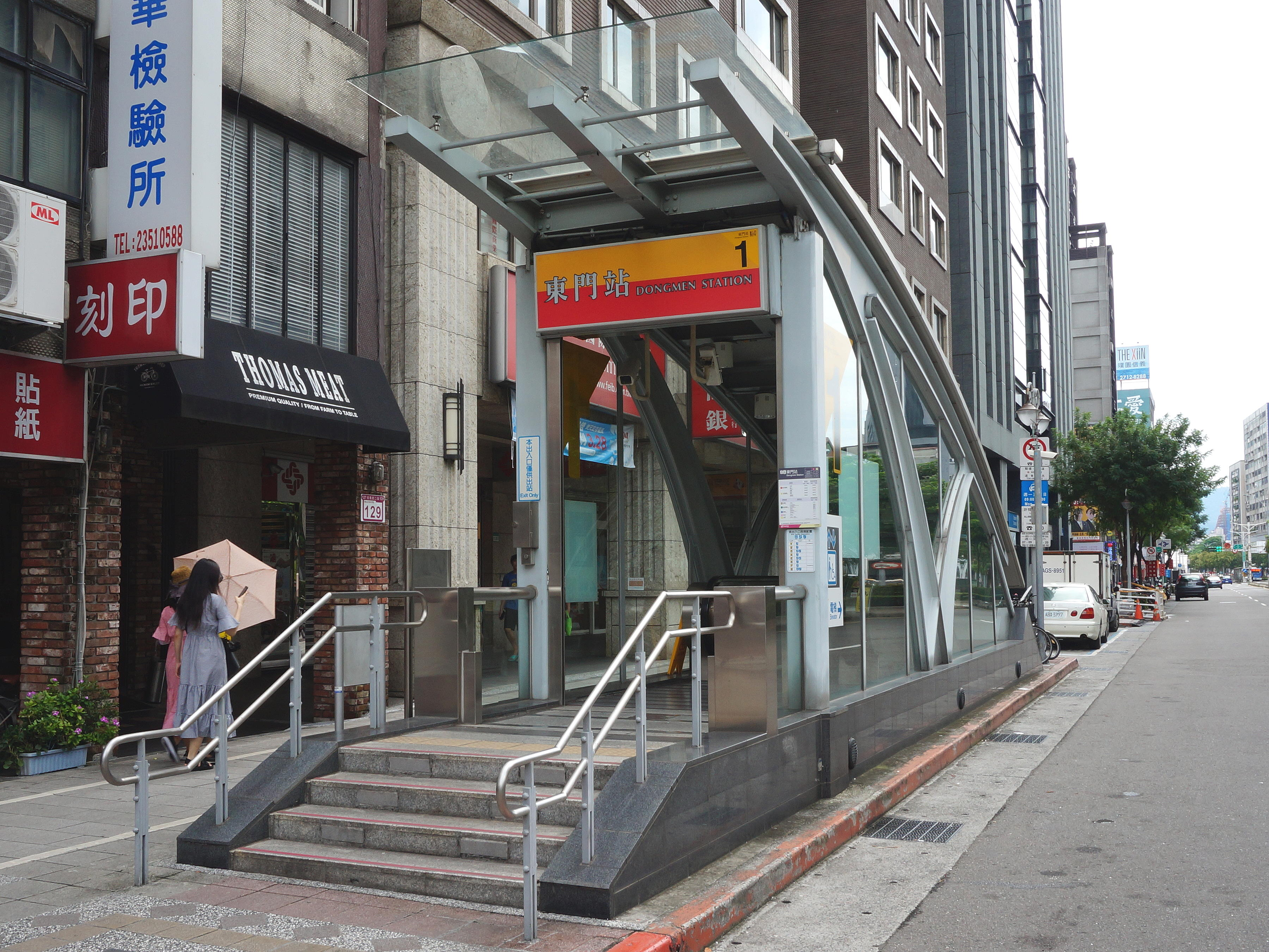 台北捷運東門站1號出口，僅供出站。